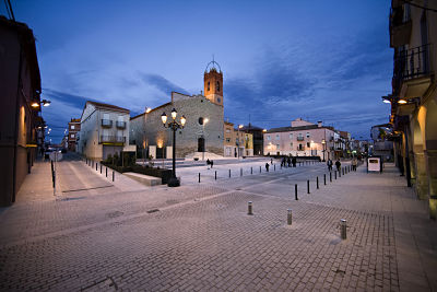 Plaça de la Vila i centre històric